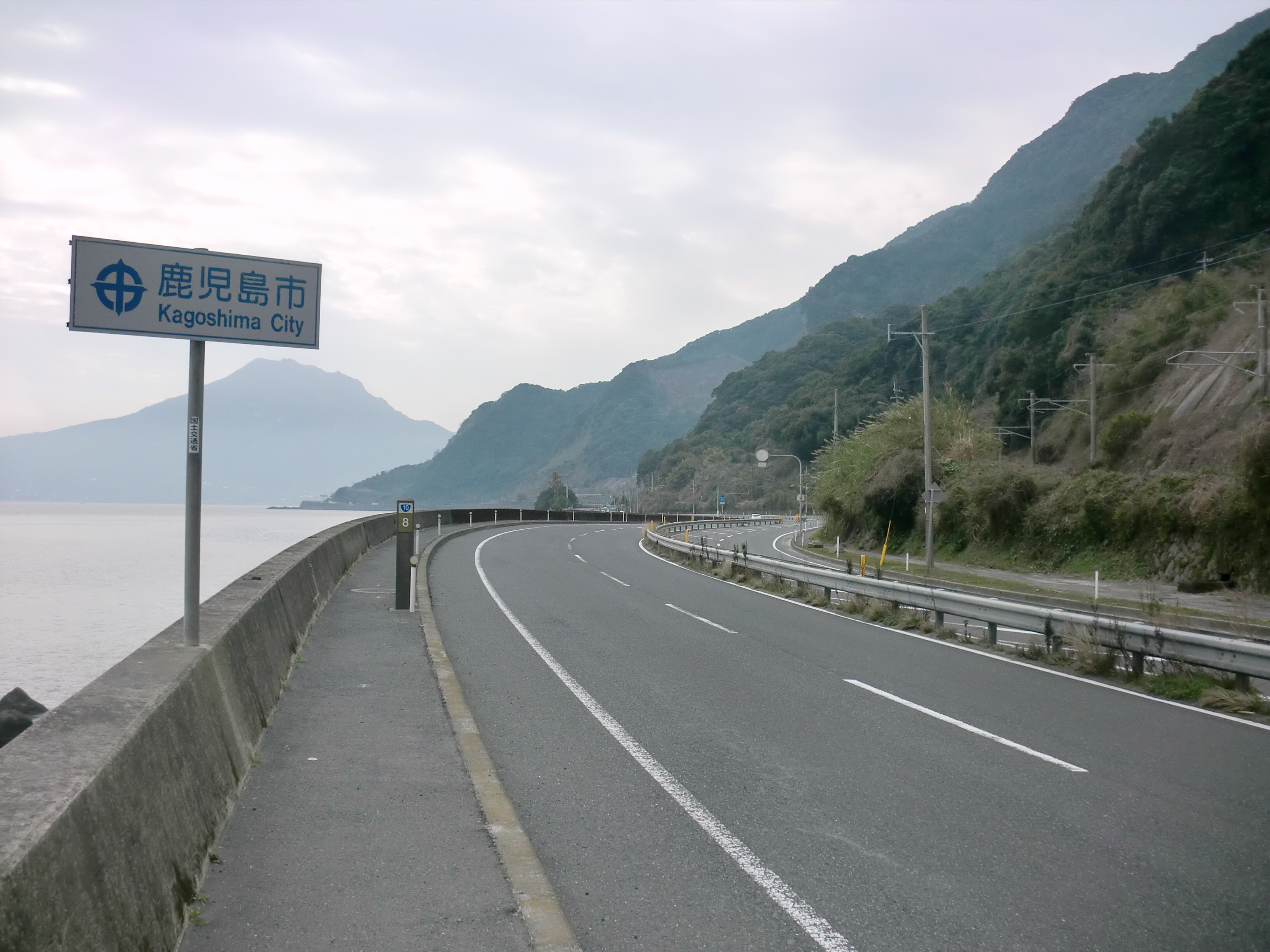 国道10号線。姶良市と鹿児島市の境界